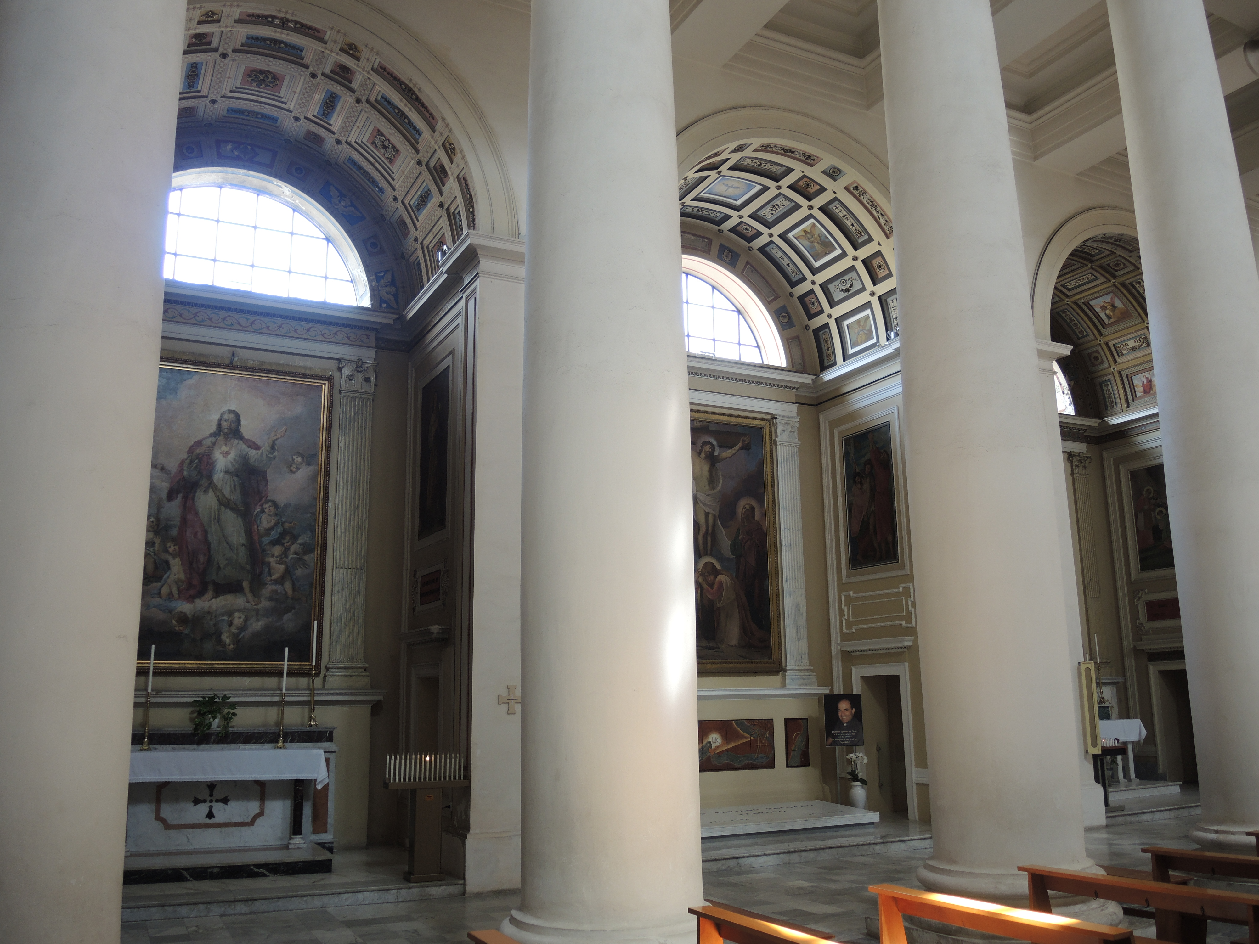 Terracina: Chiesa del Santissimo Salvatore